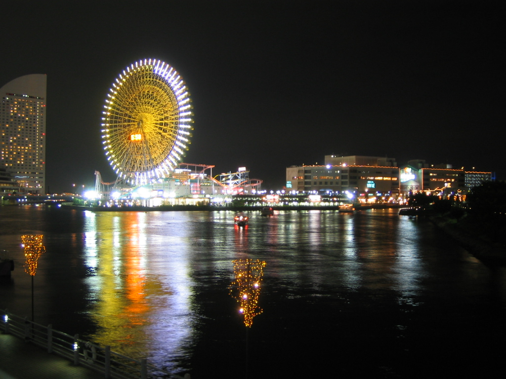 Minato Mirai 21 at night, Yokohama, Japan